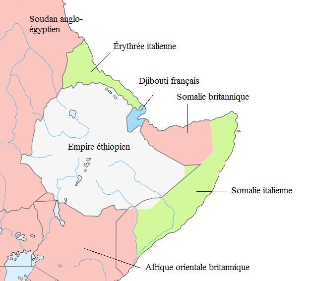 Situation coloniale de la Corne de l'Afrique dans les années 1930